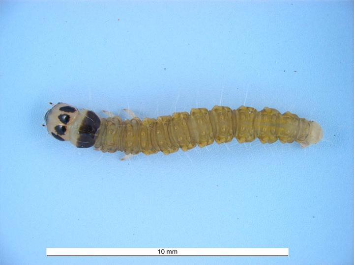 Cryptoptila immersana, larva